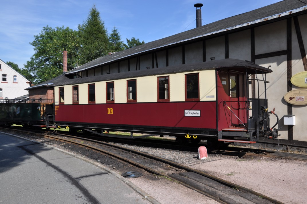 Traglastenwagen der IG Zittauer Schmalspurbahn (ehem. Beiwagen zum VT 137 322), bei der Museumsbahn Schönheide